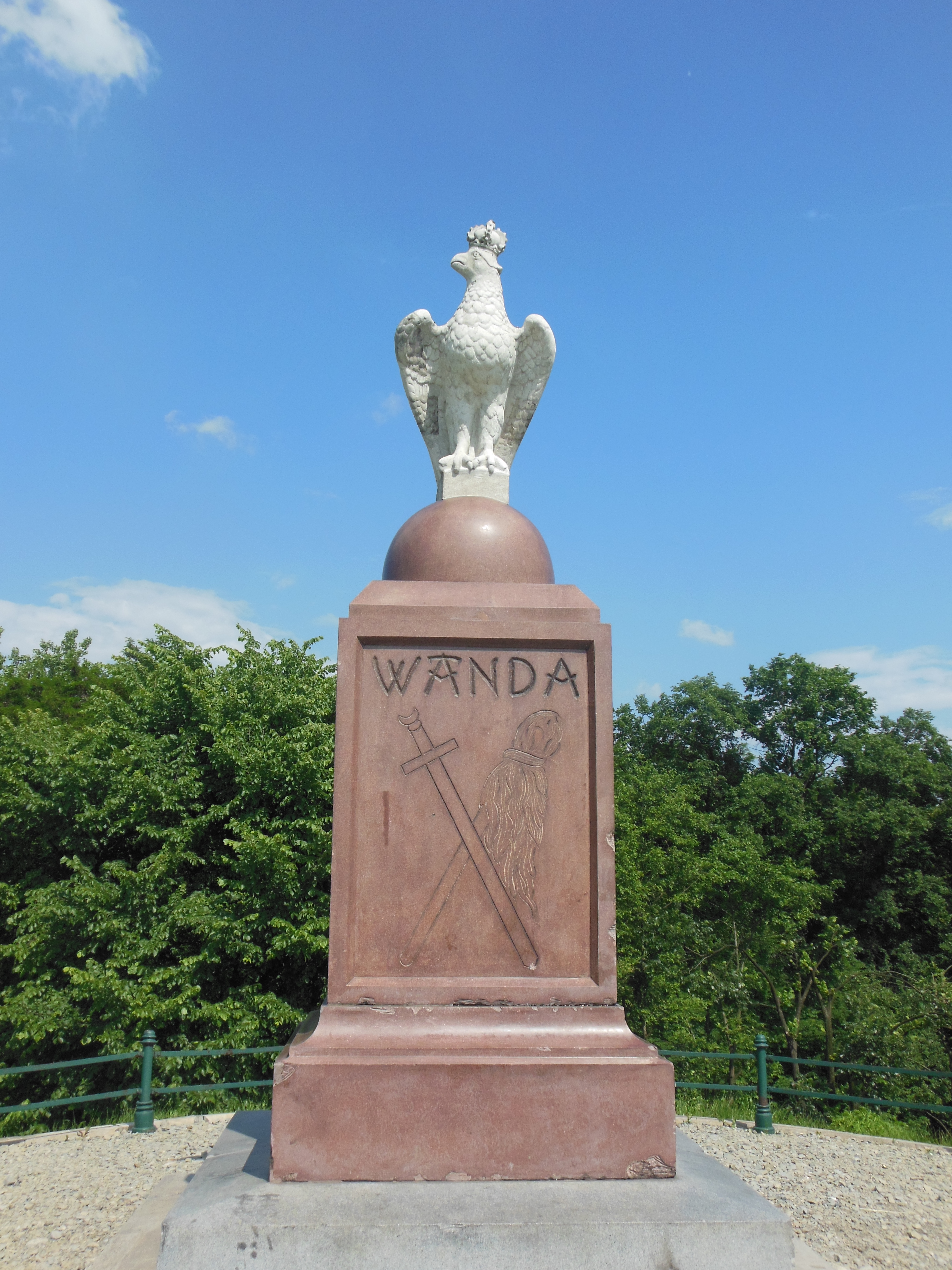 Pomnik na Kopcu Wandy projektu Jana Matejki, Kraków, Mogiła, Kraków.